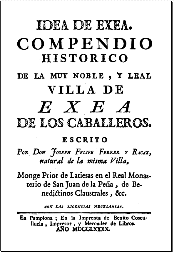 Portada del libro de José Felipe Ferrer y Racaj titulado "Idea de Exea"